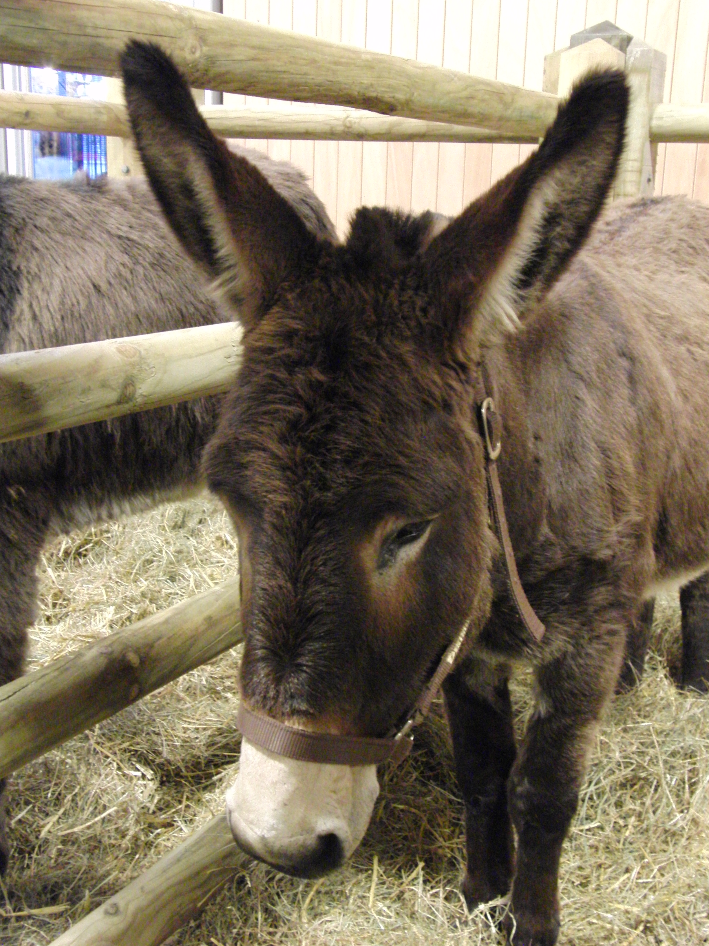 Tête d'un âne Bourbonnais - Salon international de l'agriculture 2013, Paris, France